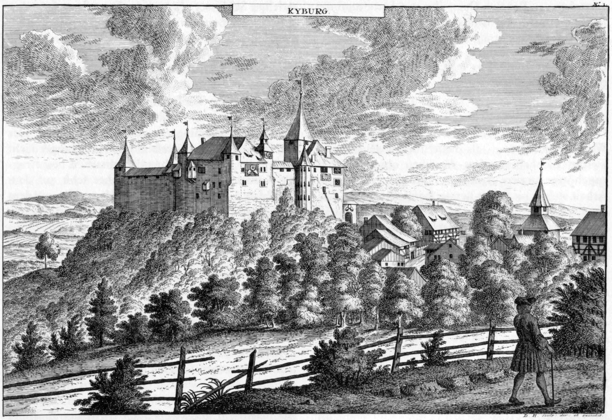 Das Landvogteischloss Kyburg der Stadt Zürich. Stich von David Herrliberger, ca. 1740. Erschienen in Representations des Chateaux ou Baillages du Louable Canton de Zuric. Dessinés d'aprés nature et gravés par David Herrliberger. Zuric 1740 / Vorstellung Loblichen Standts Zürich Schlösser, oder so genante ausere Vogteyen. Nach der natur gezeichnet, in Kupfer gebracht und verlegt durch David Herrliberger, Zurich, 1740 / Mit des Standes Zurich Hochobrigkeitlichem Privilegio. David Herrliberger f. et excutit 1740.